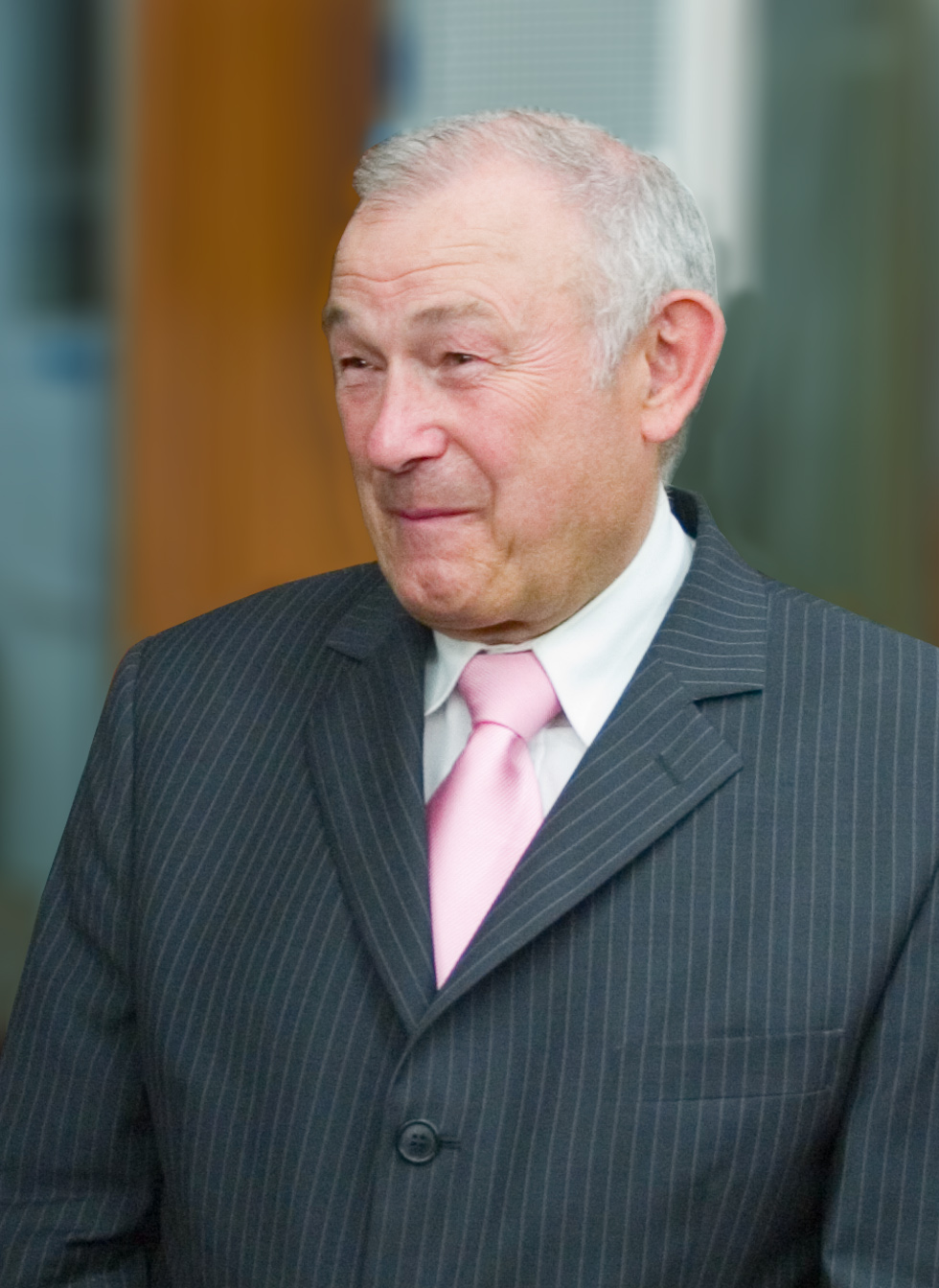 Dr. Günther Beckstein bei einem Diskussionsabend des RCDS in Würzburg